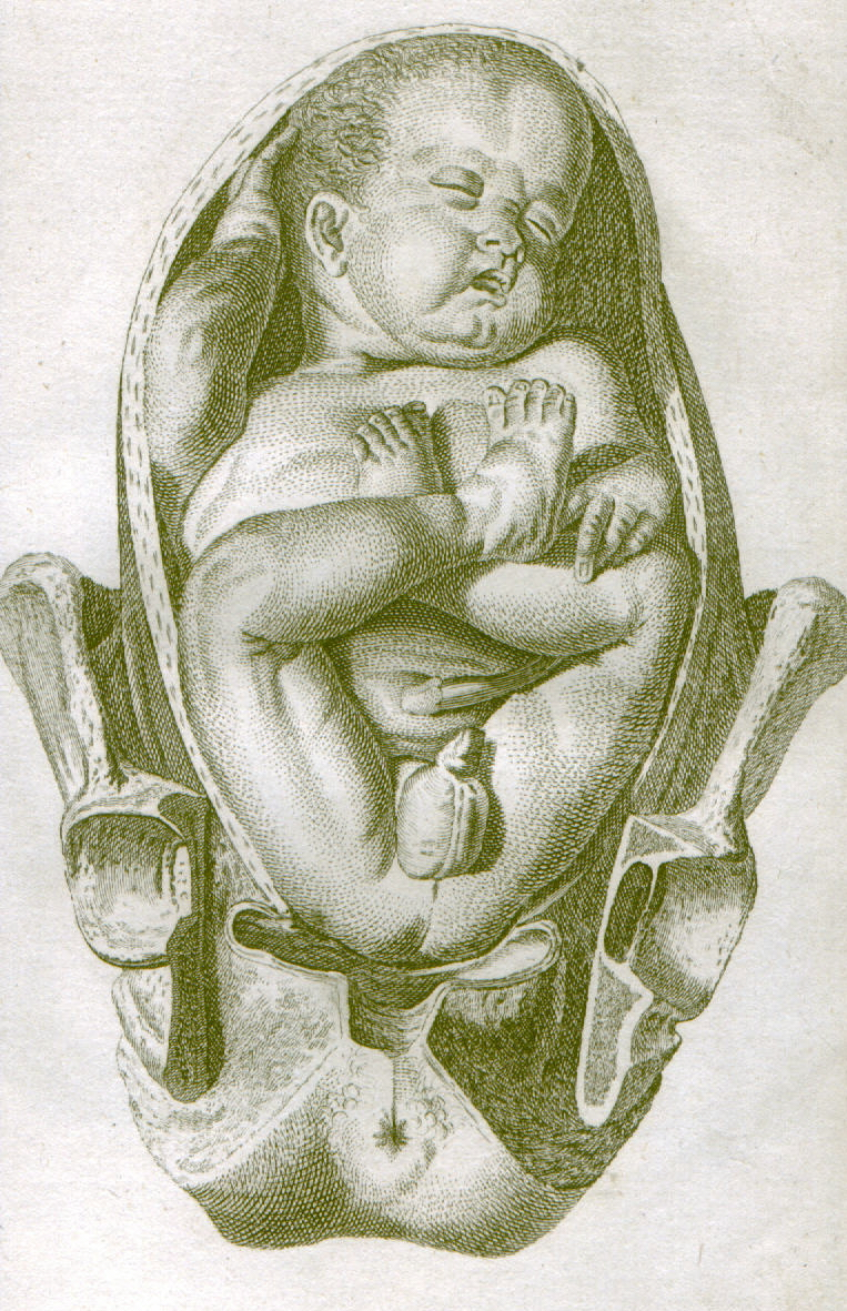 Vertex presentation, occiput anterior